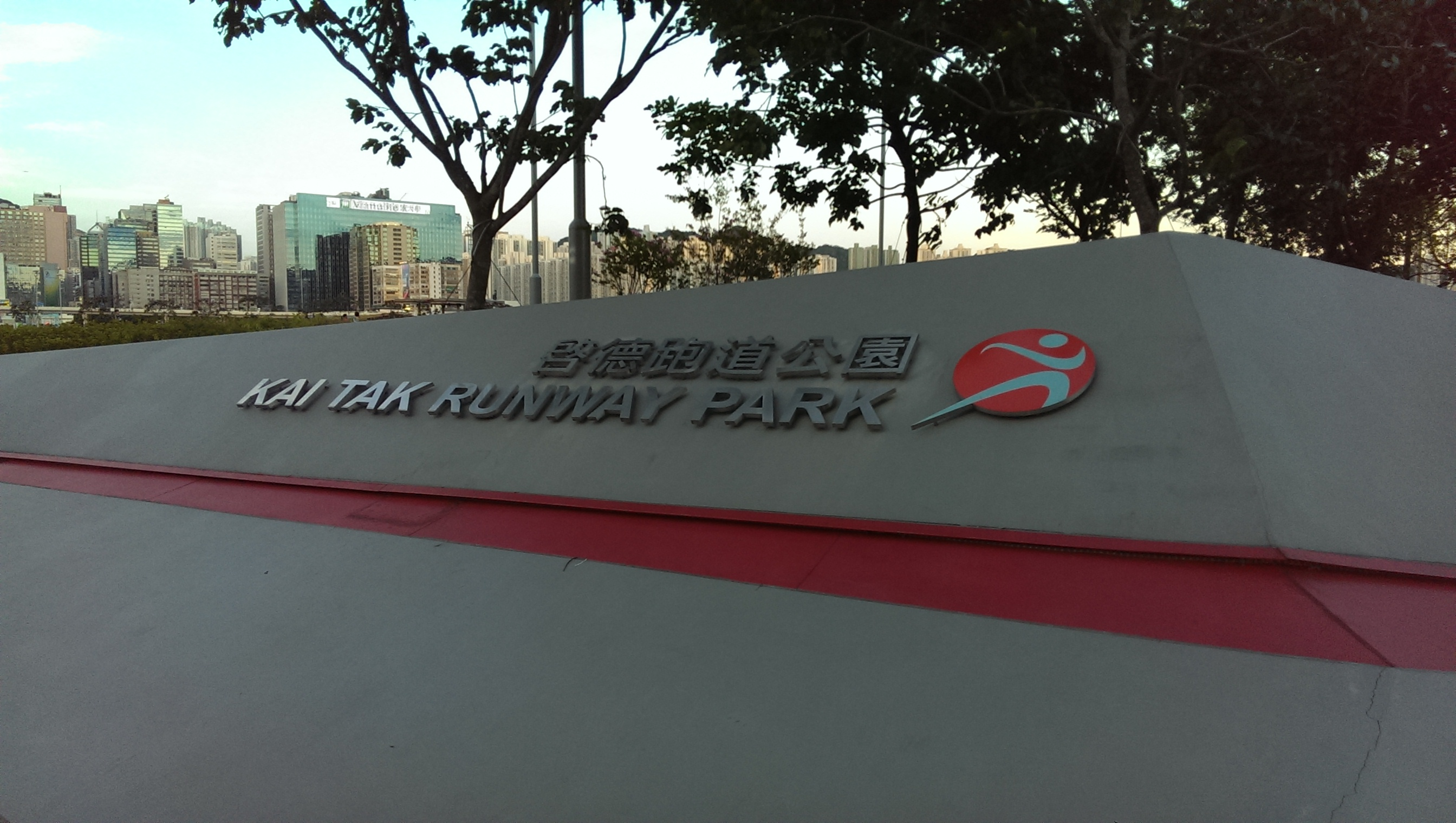 Entrée du Parc